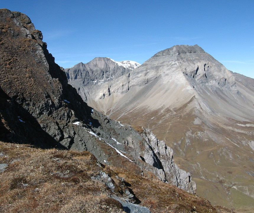 Piz Dolf rechts, gesehen vom östlichen Ende des Fil de Cassons